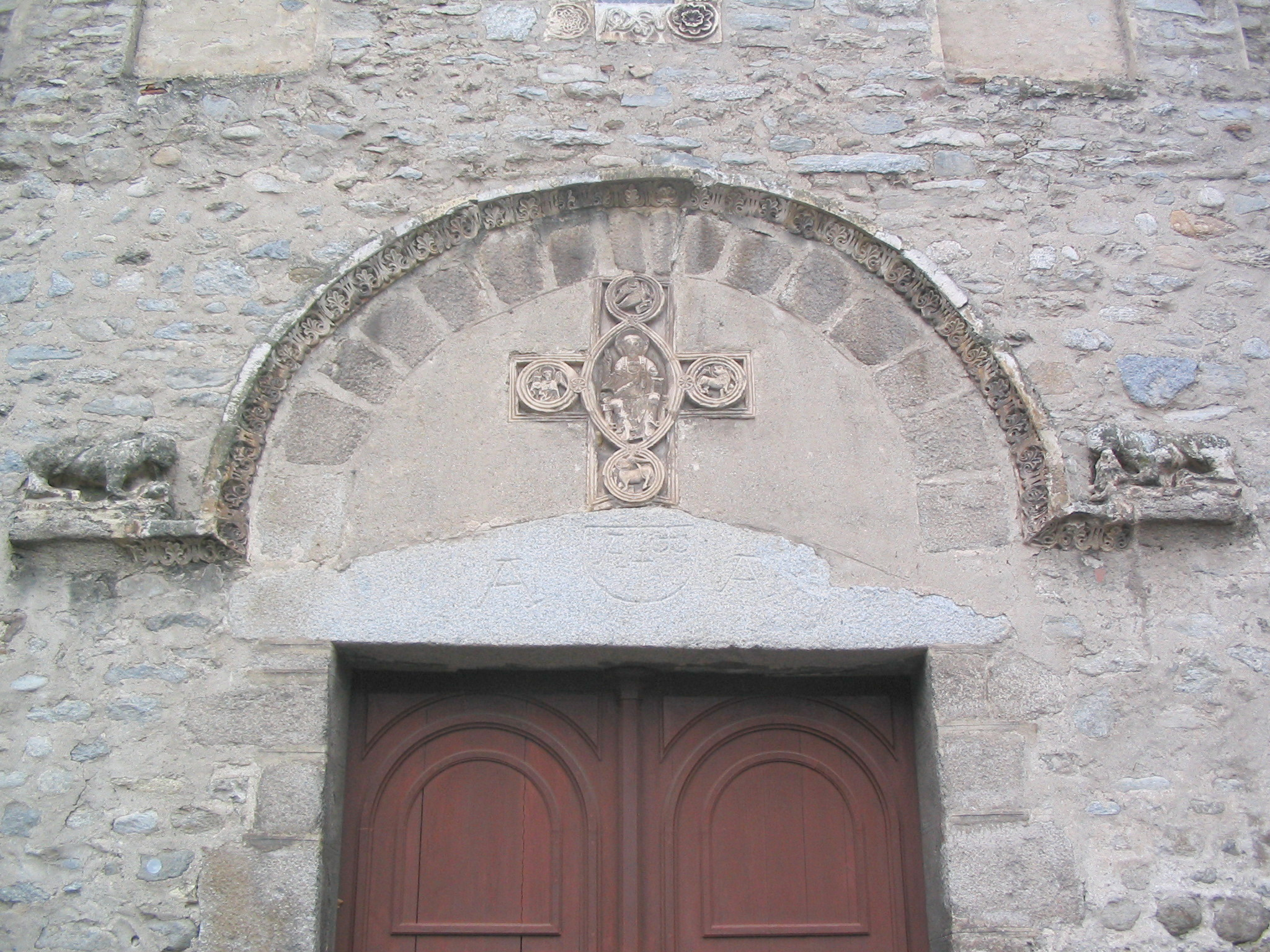 Eglise Santa Creu d'Arles-sur-Tech (Pyrénées-Orientales, 66), inscrite sur la liste des Monuments Historiques de France, depuis le 7 juillet 1997 (PA66000003). .